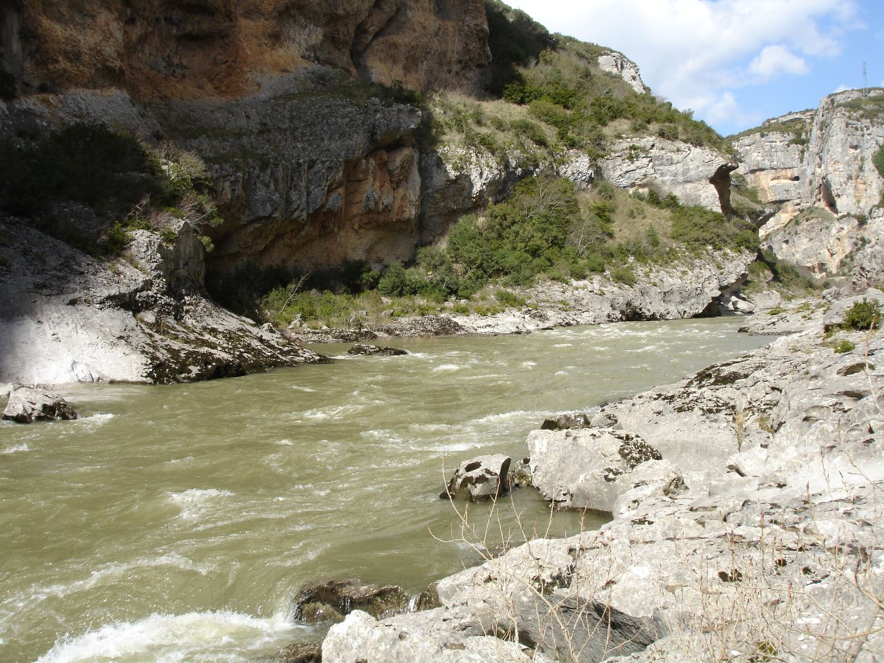 Aragonés: Foz de Lumbier